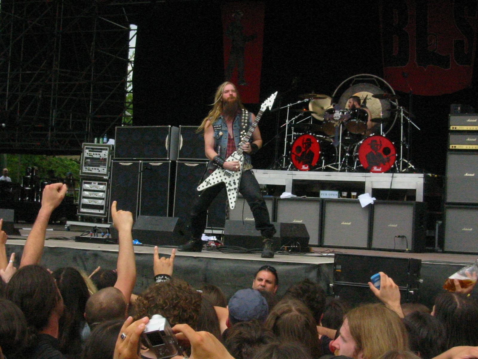 Zakk Wylde - Summer Bologna 2005 - Gods Of Metal.